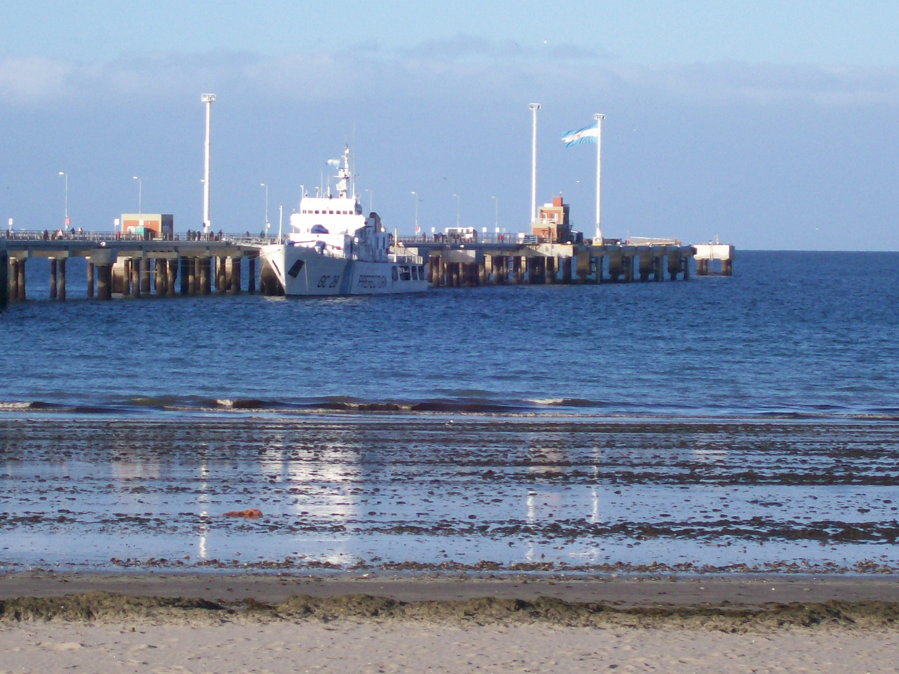 vista al muelle